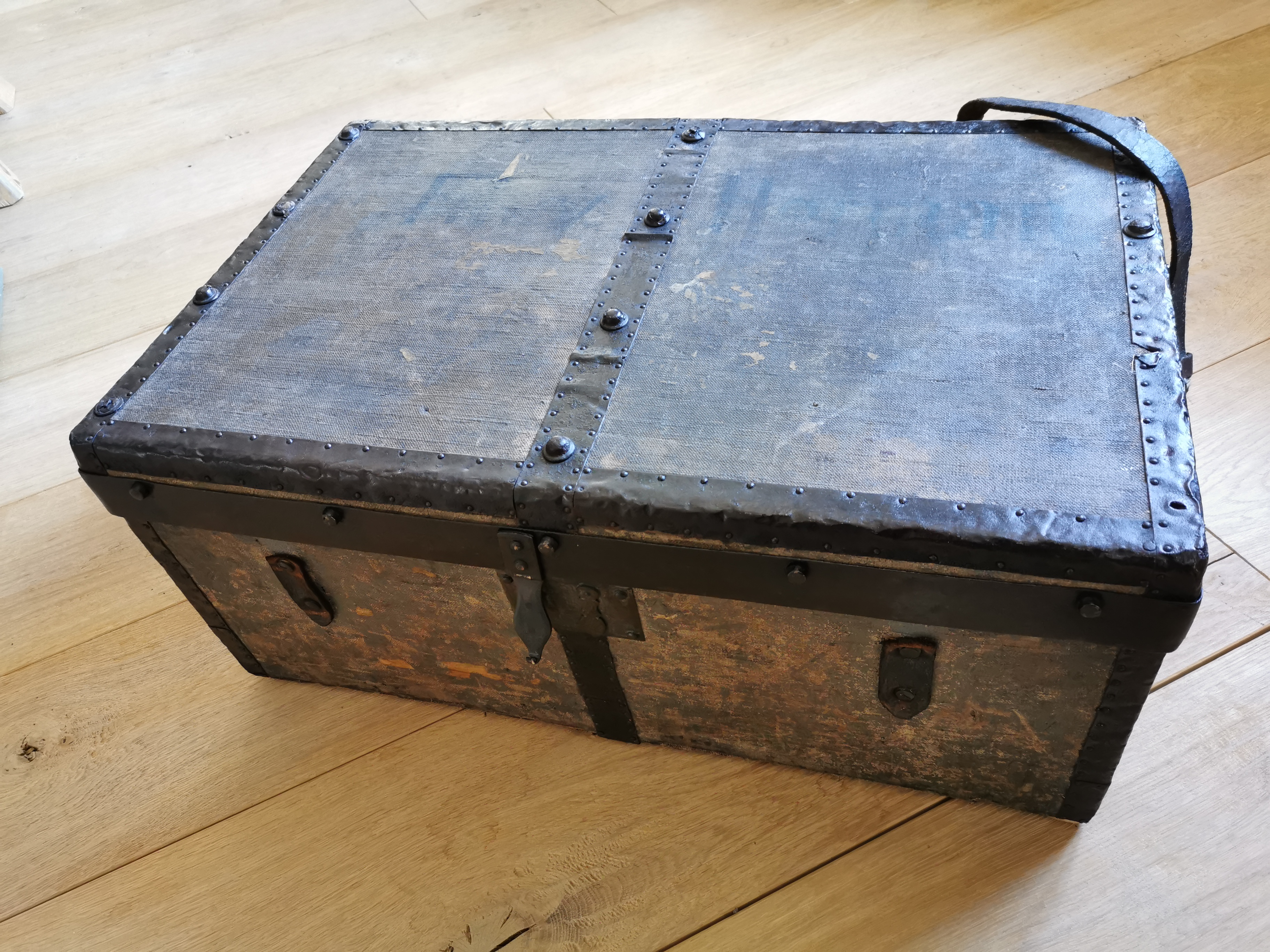 Reisekoffer des k.u.k.-Offiziers Ottmar von Herman (1835-1902), den er für seinen Aufenthalt im Kohlhof bei Heidelberg nutzte